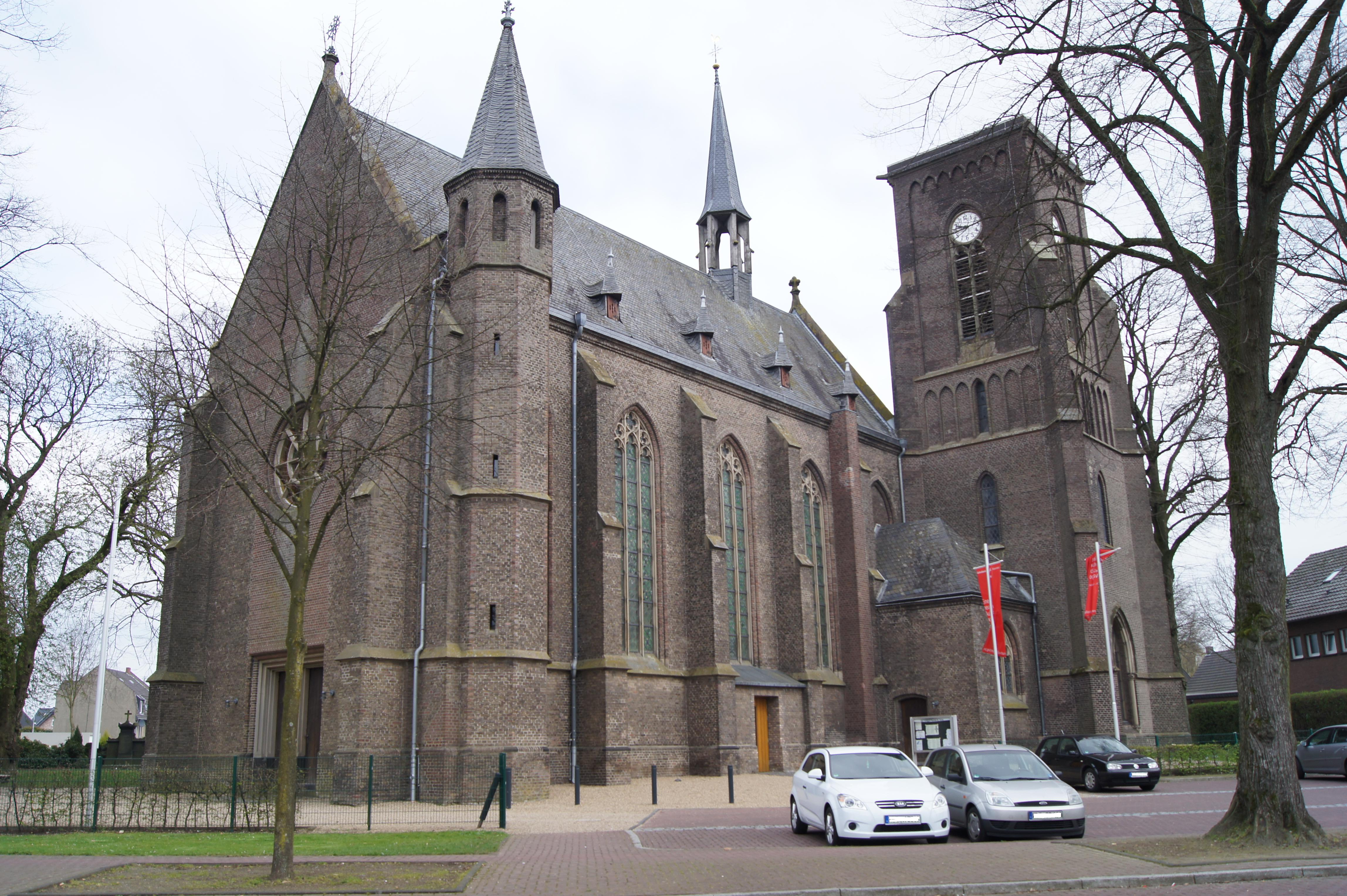 Katholische Pfarrkirche Sankt Anna, Kleve MaterbornThis is a photograph of an architectural monument., no. 103